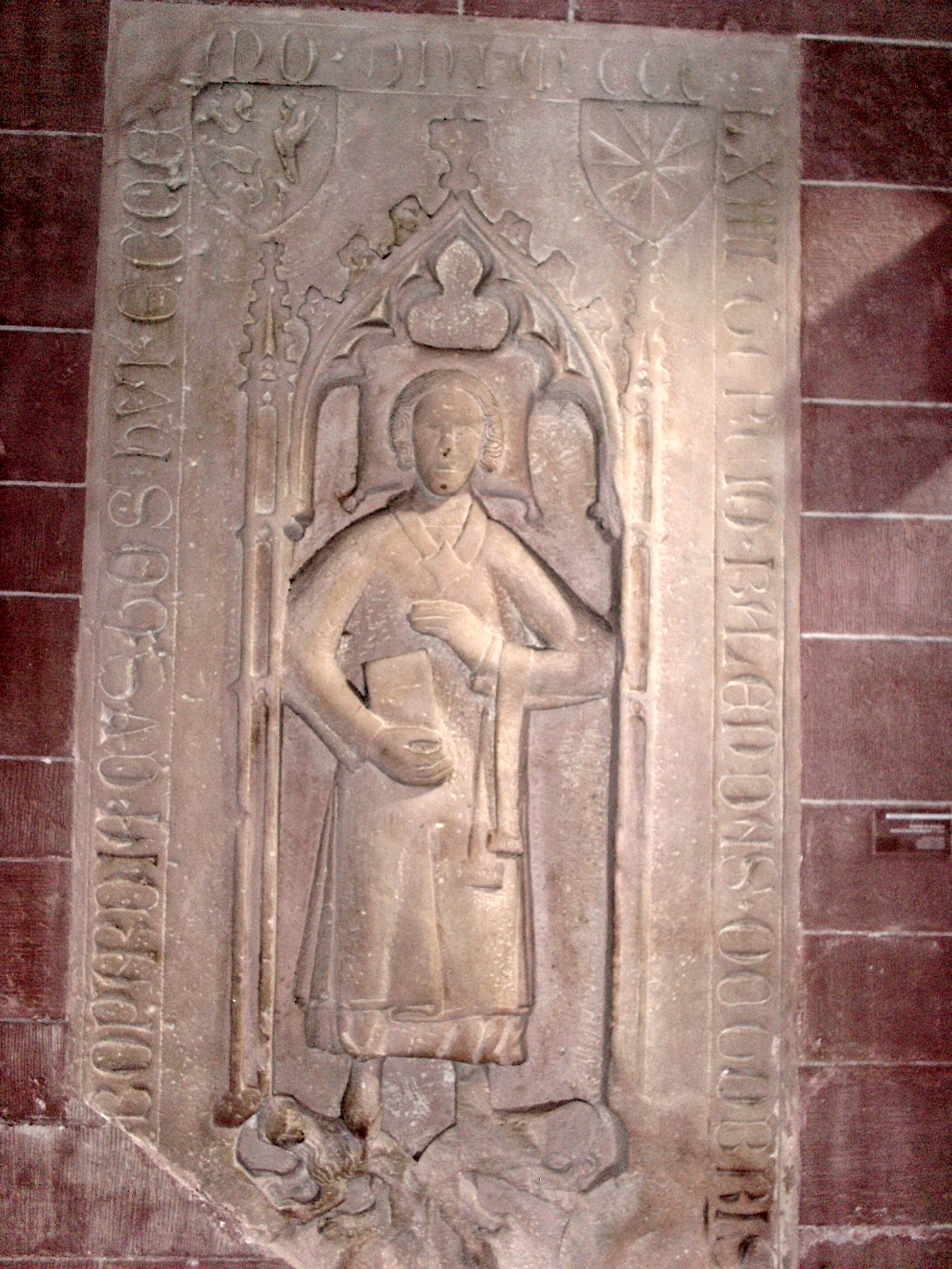 Reinhard Beyer zu Boppard, Dokustos in Worms, + 1364